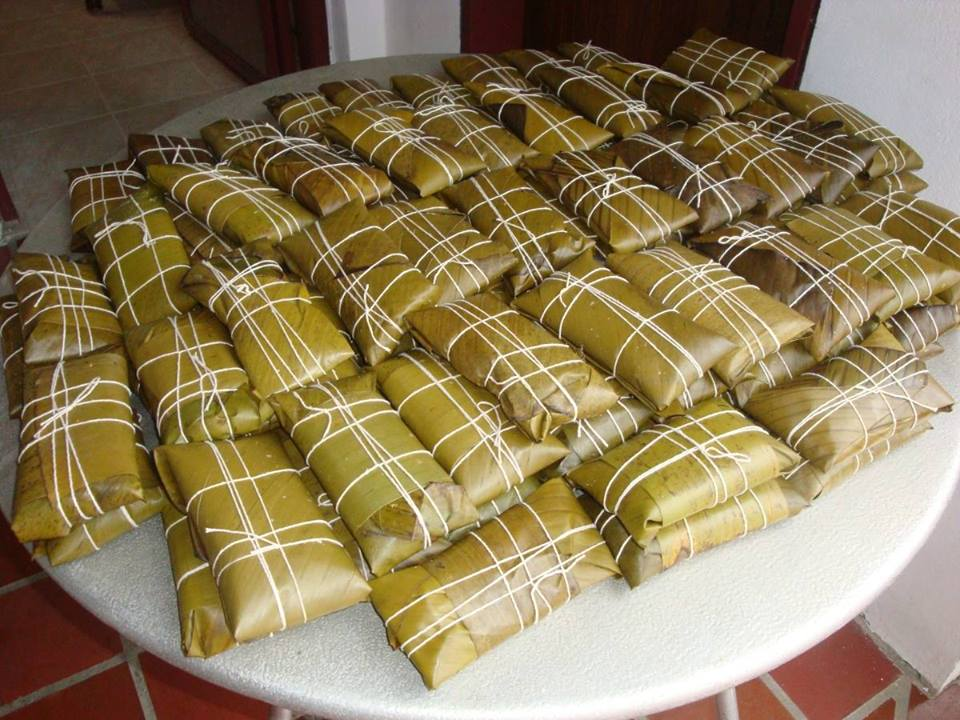 Hallacas plato tipico tradicional de Venezuela